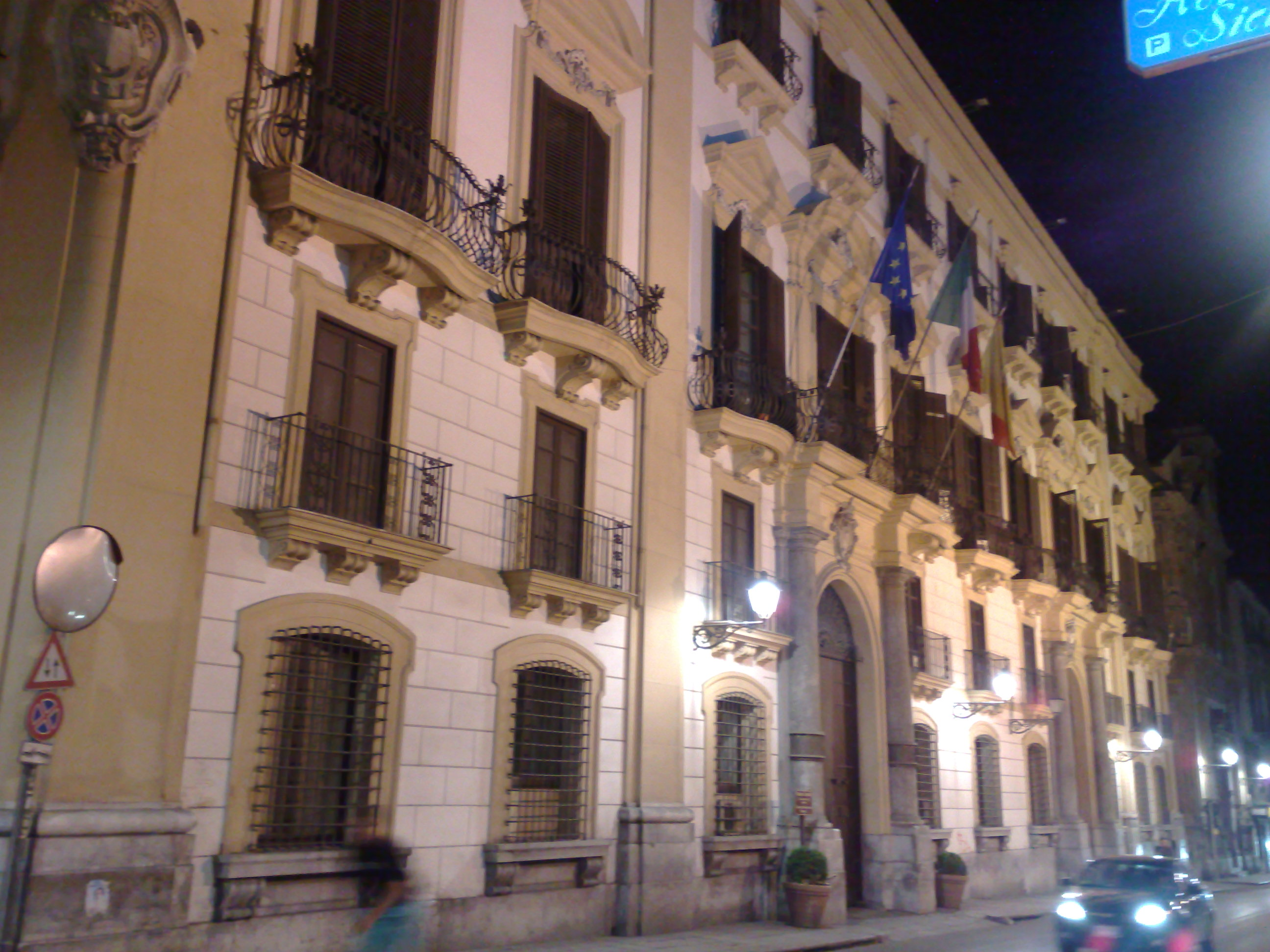 Palazzo Comitini (via Maqueda, Palermo), sede della Provincia Regionale di Palermo